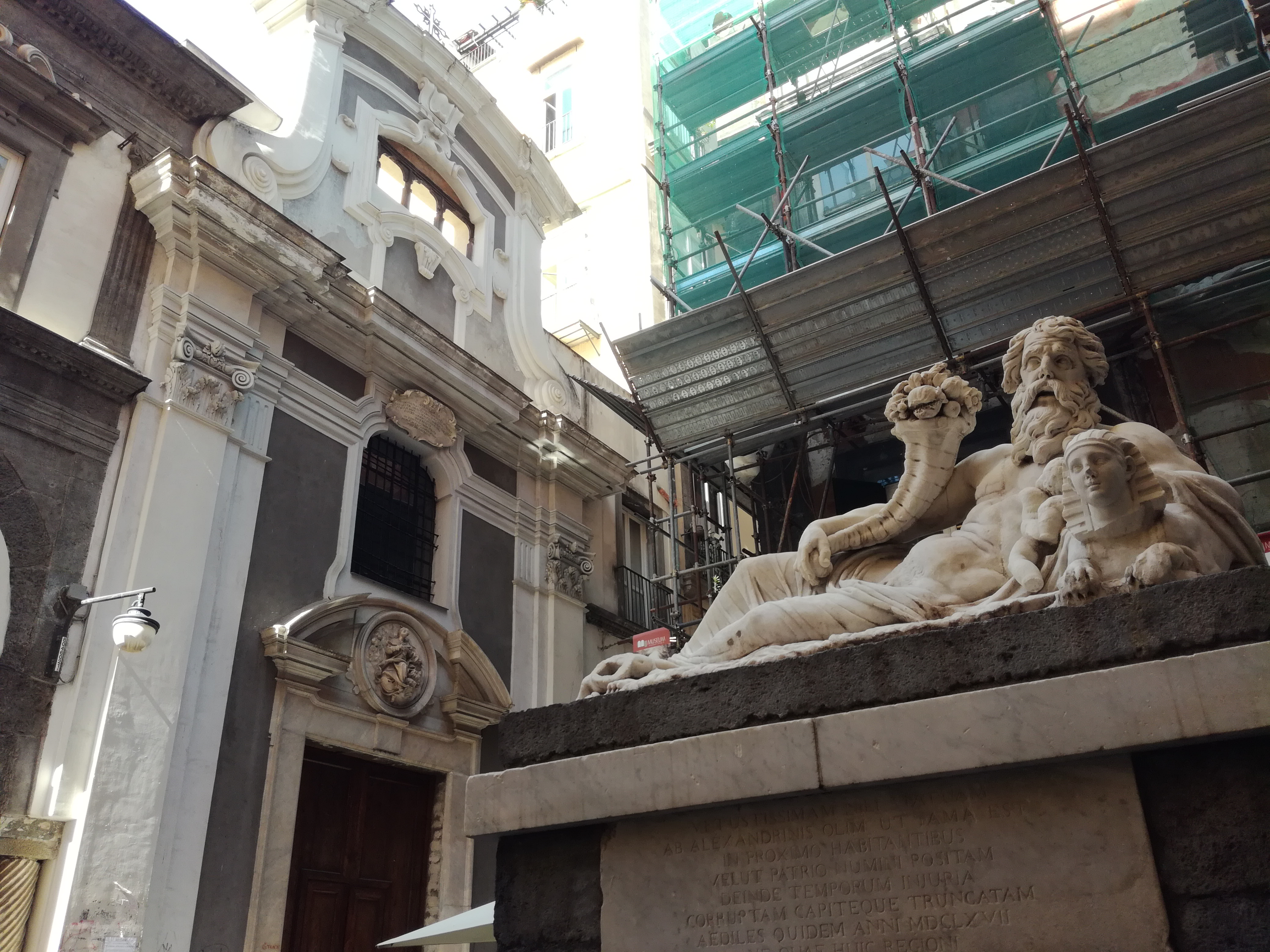 Facciata di Santa Maria Assunta dei Pignatelli (Napoli)